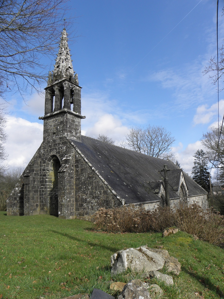 Façade occidentale et flanc sud de la chapelle Notre-Dame-de-la-Fontaine-Blanche en Plougastel-Daoulas (29).